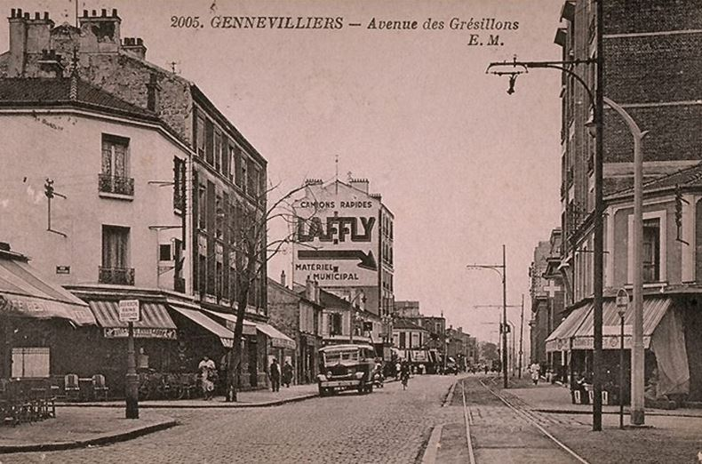 Gennevilliers.Avenue des Grésillons